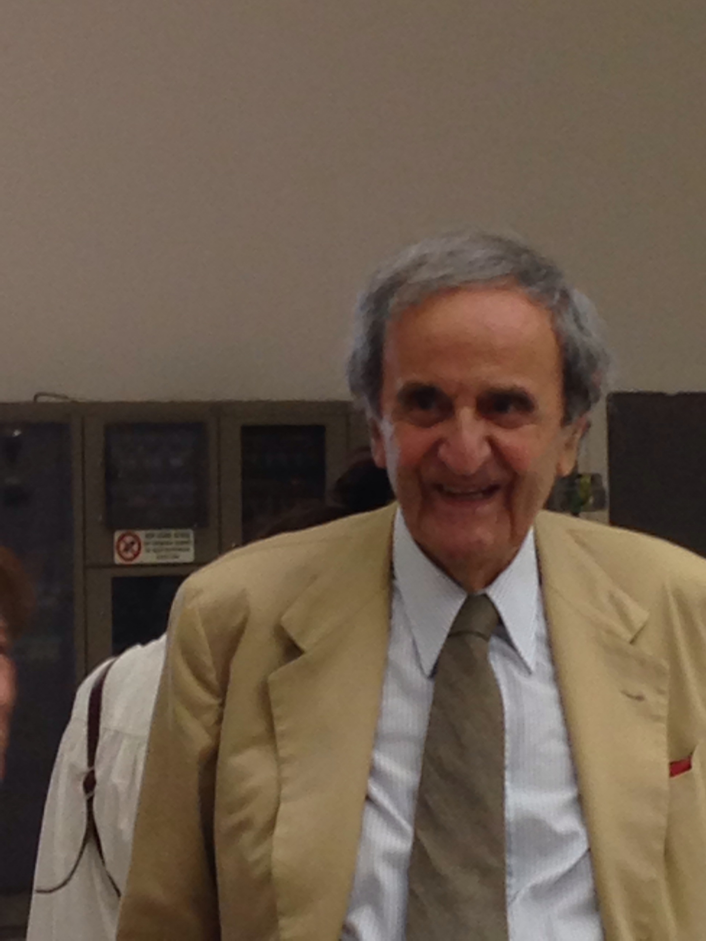 Tomás Maldonado alla Triennale di Milano il 19 giugno 2014